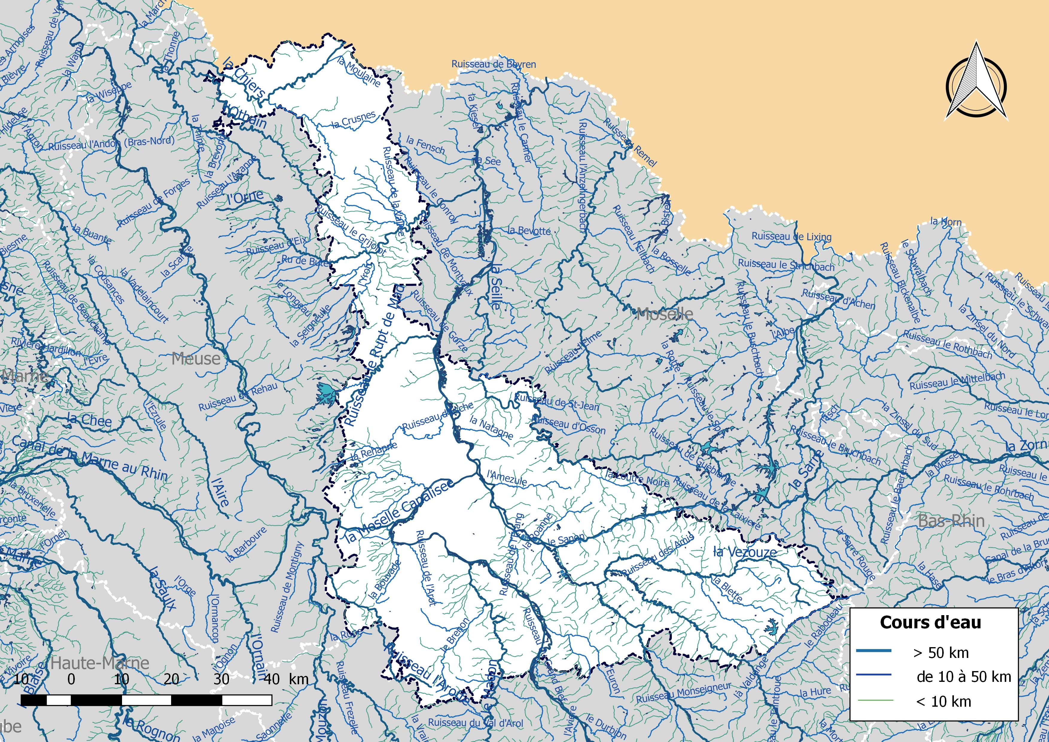 Réseau hydrographique du département de la Meurthe-et-Moselle (France).